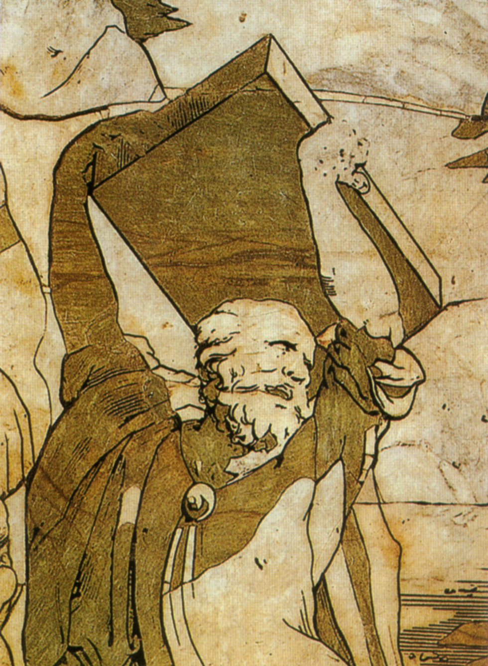 Pavimento di siena, storie di mosè sul sinai (beccafumi)